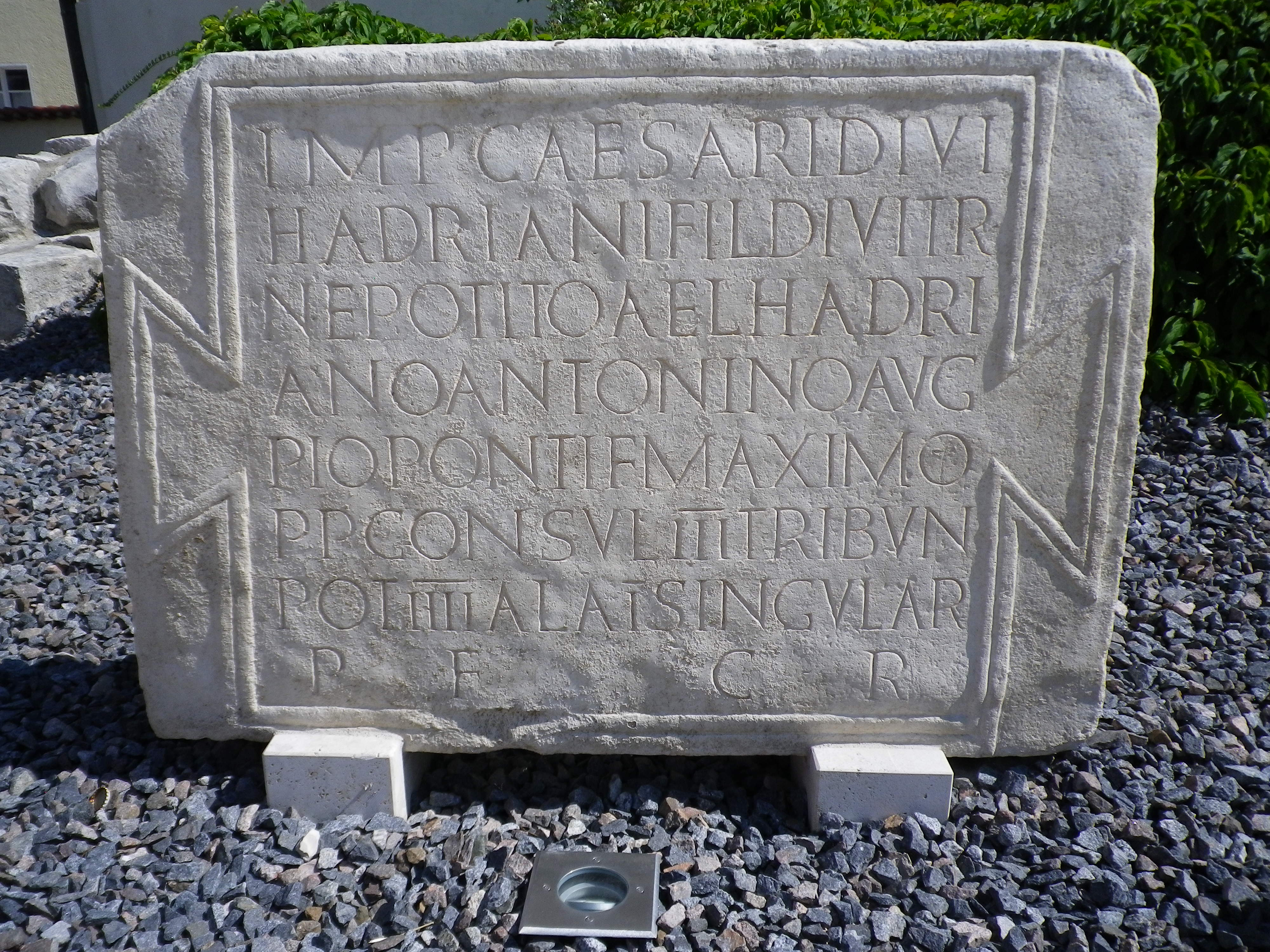 Kopie der Bauinschrift des Kastell Pförring (Celeusum). Inschrift: Imp(eratori) Caesari divi / Hadriani fil(io) divi Tr(aiani) / nepo(ti) Tito Ael(io) Hadri/ano Antonino Aug(usto) / Pio pontif(ici) maximo / p(atri) p(atriae) consul(i) III tribun(icia) / pot(estate) IIII ala I singular(ium) / p(ia) f(idelis) c(ivium) R(omanorum). Epigraphische Datenbank Heidelberg HD058814.